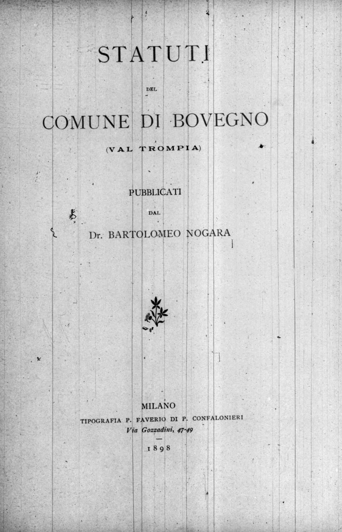 Frontespizio